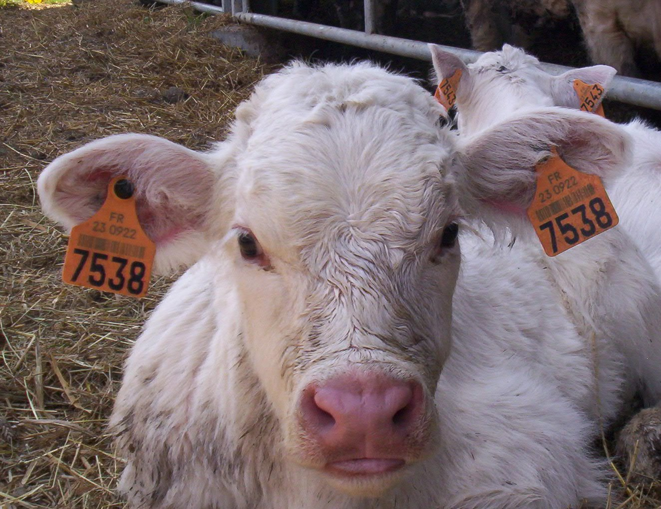 Veau charolais avec deux boucles d'identification.